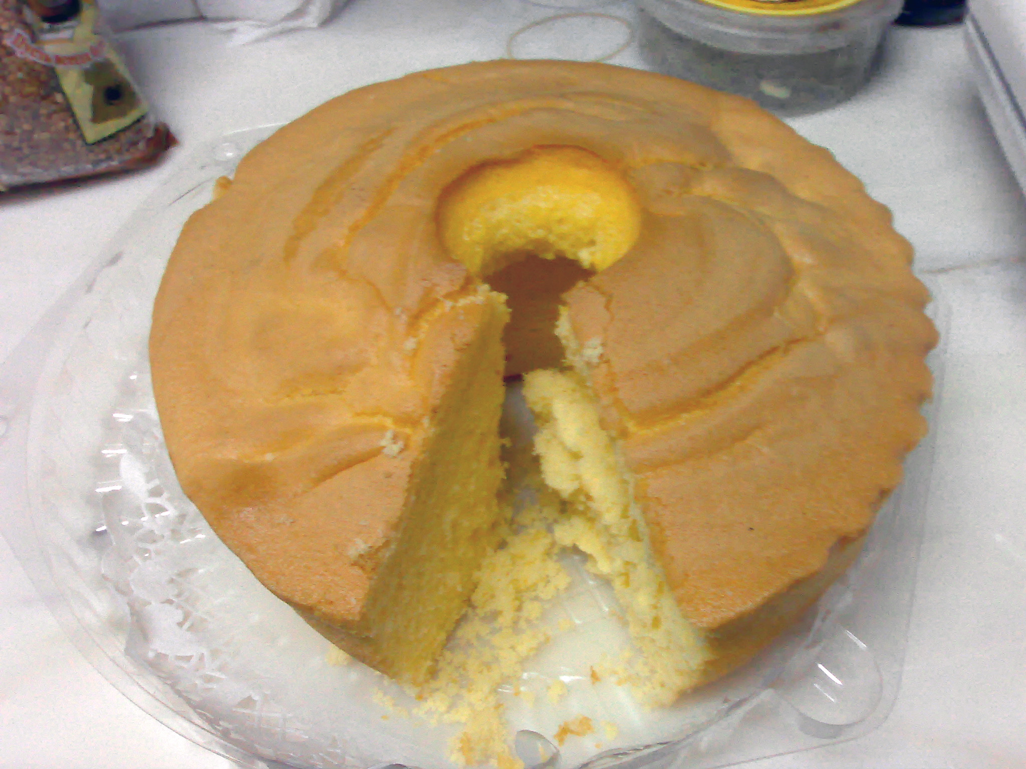 Pão-de-ló, um bolo português. Pão-de-ló, a portuguese cake.